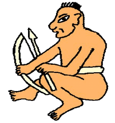 Glifo de Pacula, Hidalgo